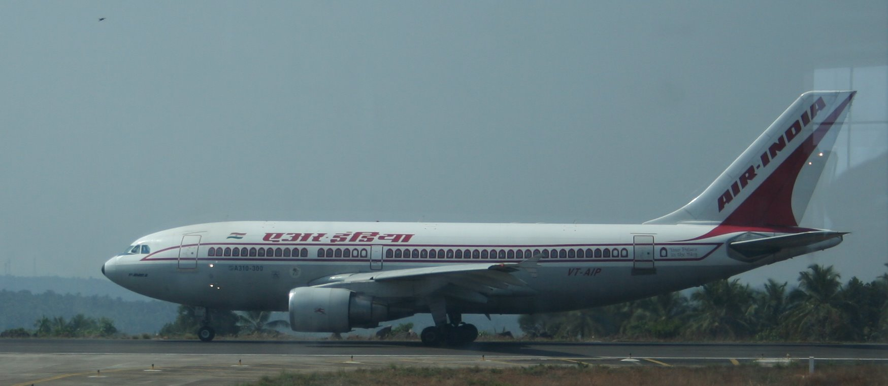 ഏയര്‍ ഇന്ത്യയുടെ ‌‌എ‌310-300 വിമാനം 'പമ്പ' കോഴിക്കോട് അന്താരാഷ്ട്ര വിമാനത്താവളത്തില്‍